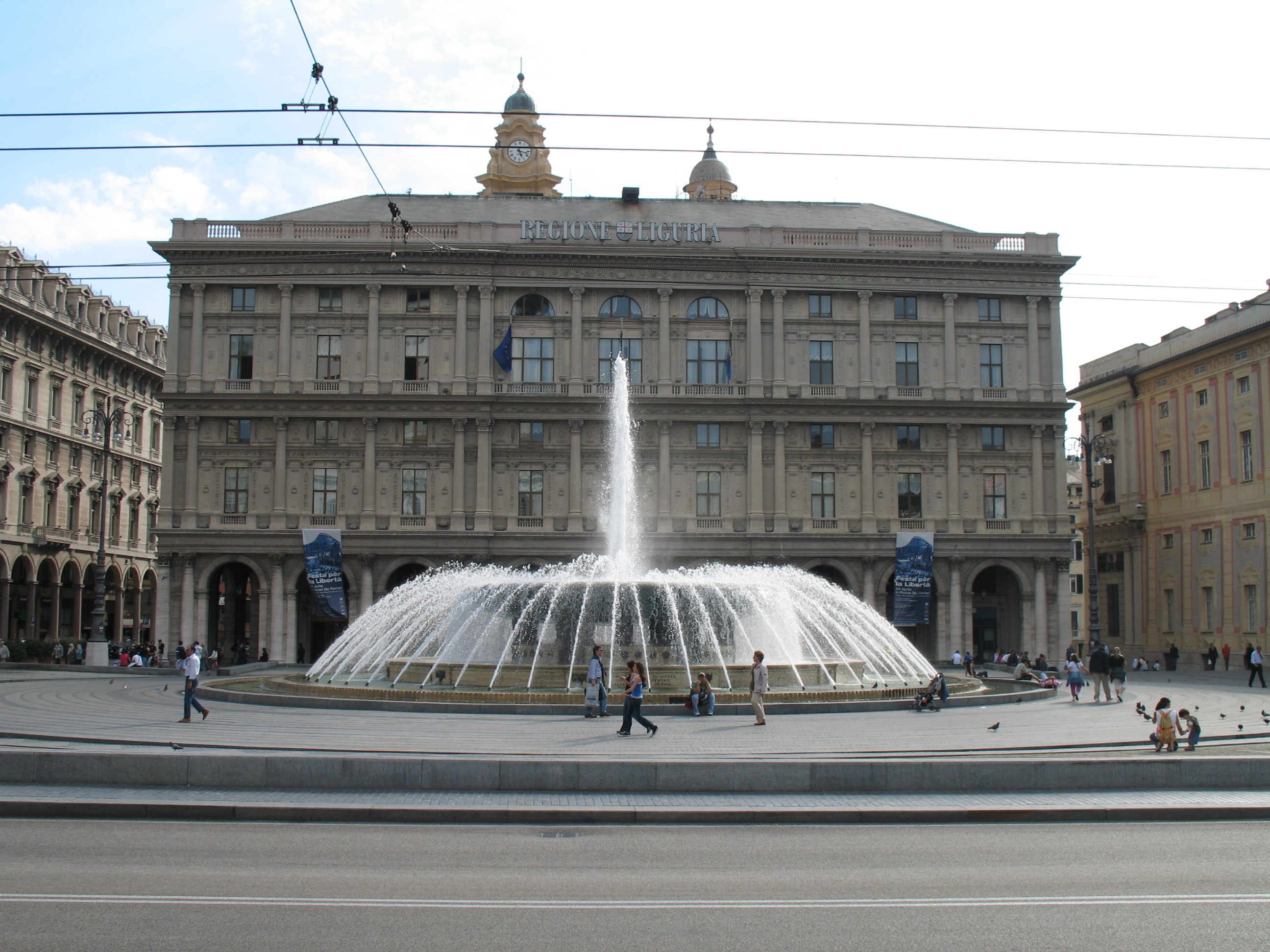 Genova